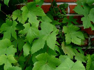 Vitis